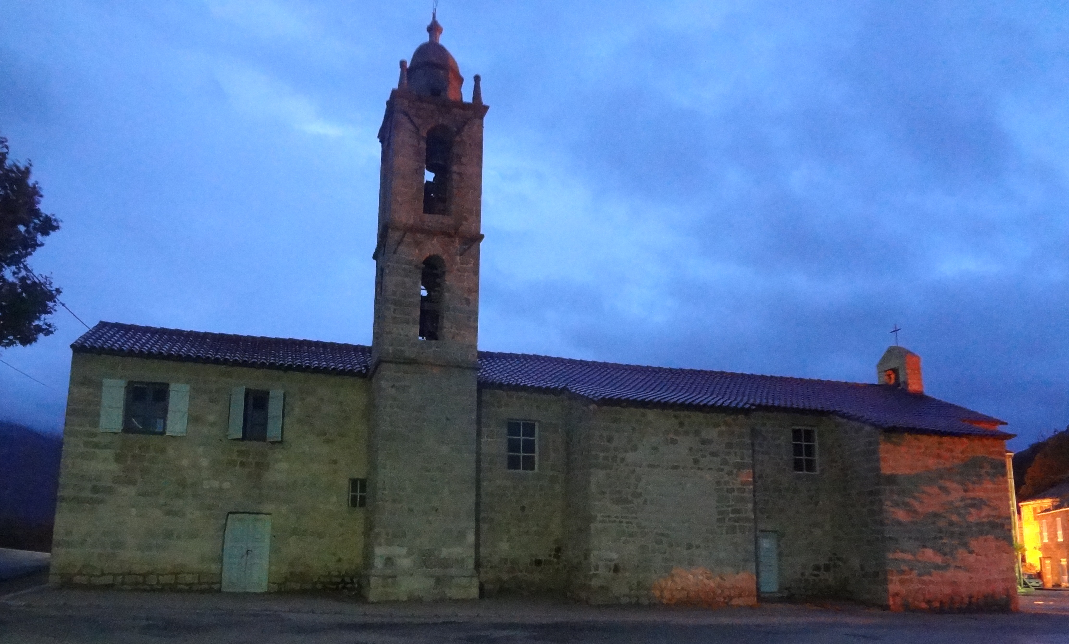 Église Saint-Nicolas d'Aullène, Corse (Inscrit, 1990) .